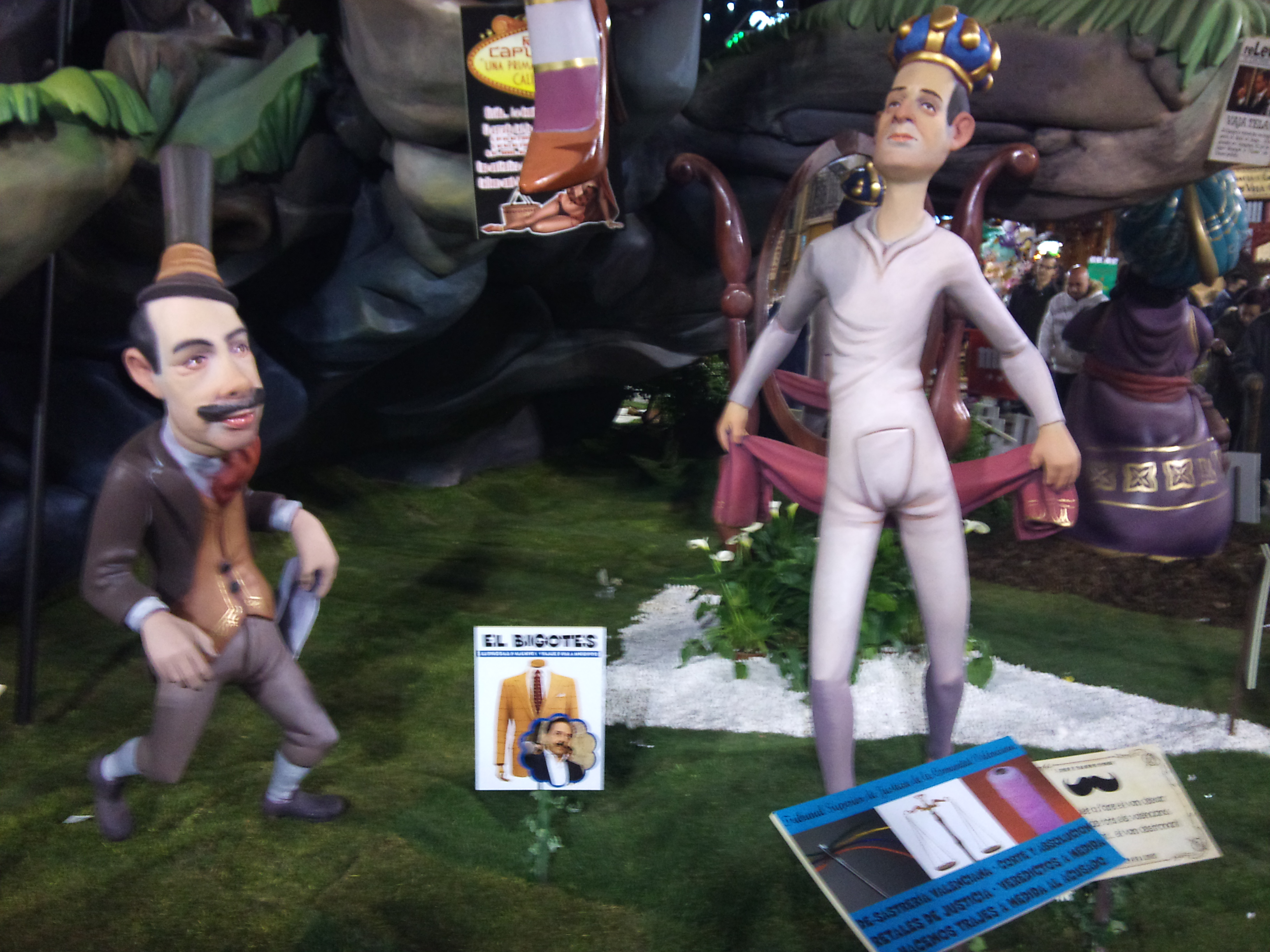 Detalls del monument de 2012